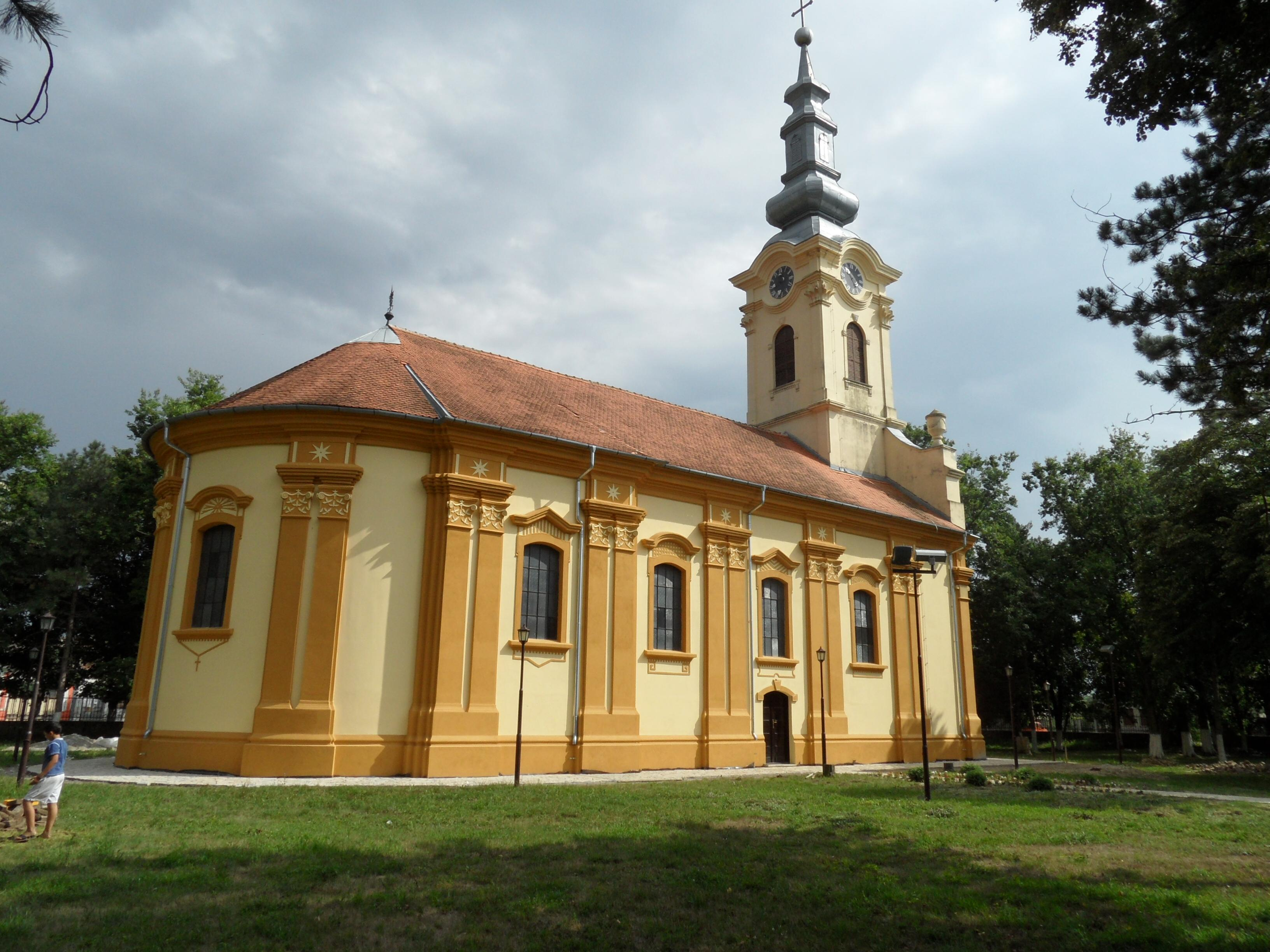 Srpska pravoslavna crkva Sv. Georgija u Čenti